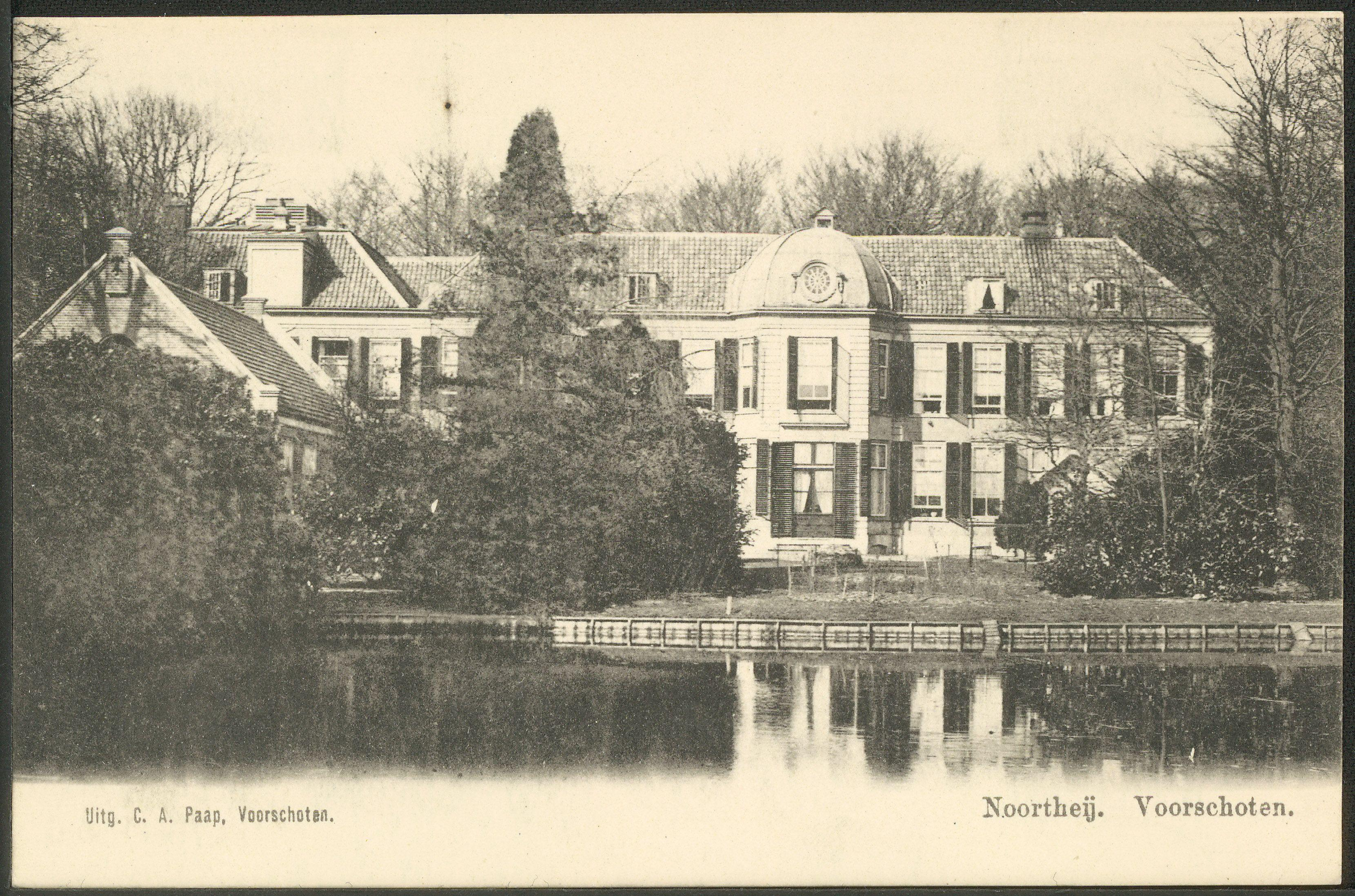 Gezicht op het landhuis Stadwijk (Instituut Noorthey) te Voorschoten, ca. 1900. Prentbriefkaart C.A. Paap